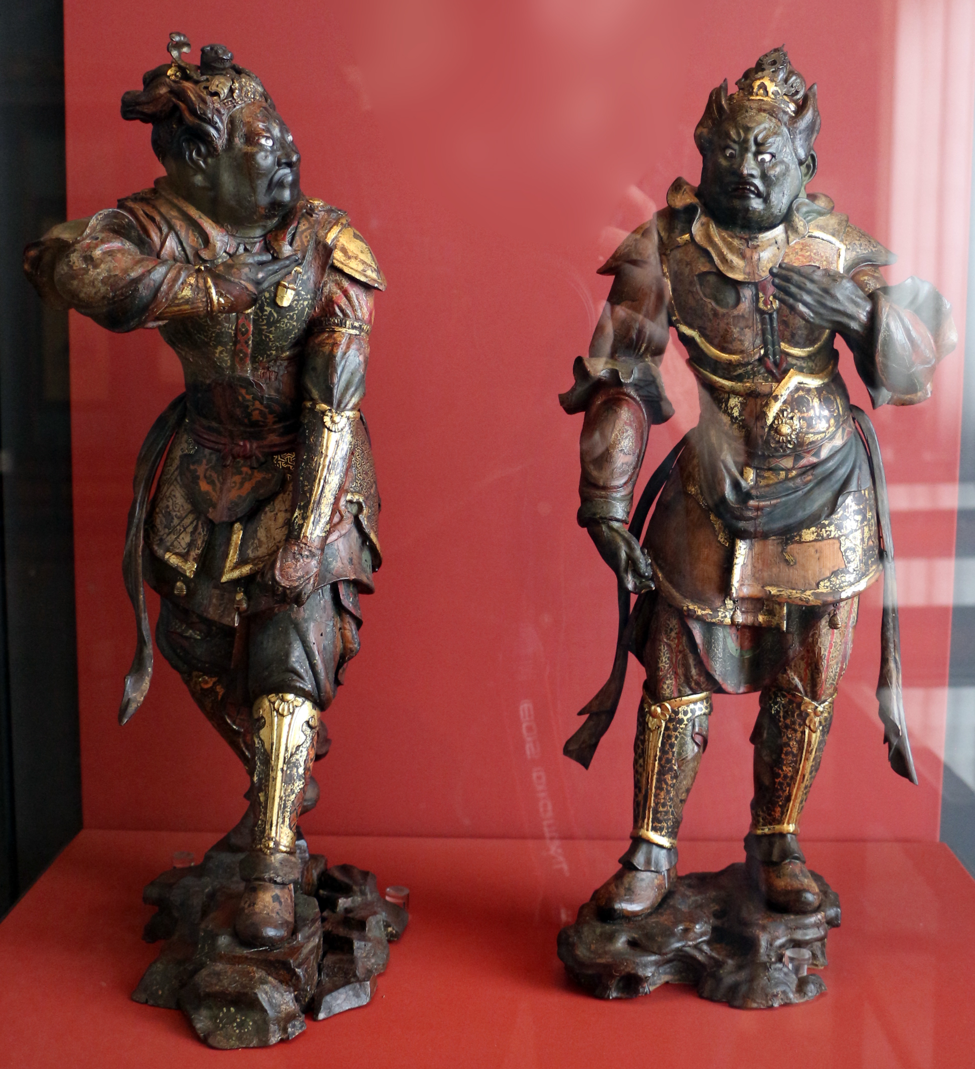 Museo Archeologico Nazionale This is a photo of a monument which is part of cultural heritage of Italy.